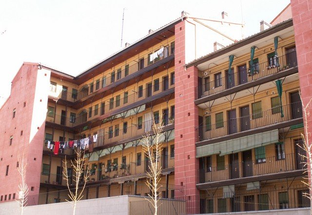 Corrala situada entre las calles Tribulete, 12 y Sombrerete, 13, en Madrid (España). Esta fachada da a la calle Mesón de Paredes. Su construcción data de 1872. Restaurada en 1979. En la actualidad el patio se utiliza para representaciones de Zarzuelas y otras obras del Género Chico.